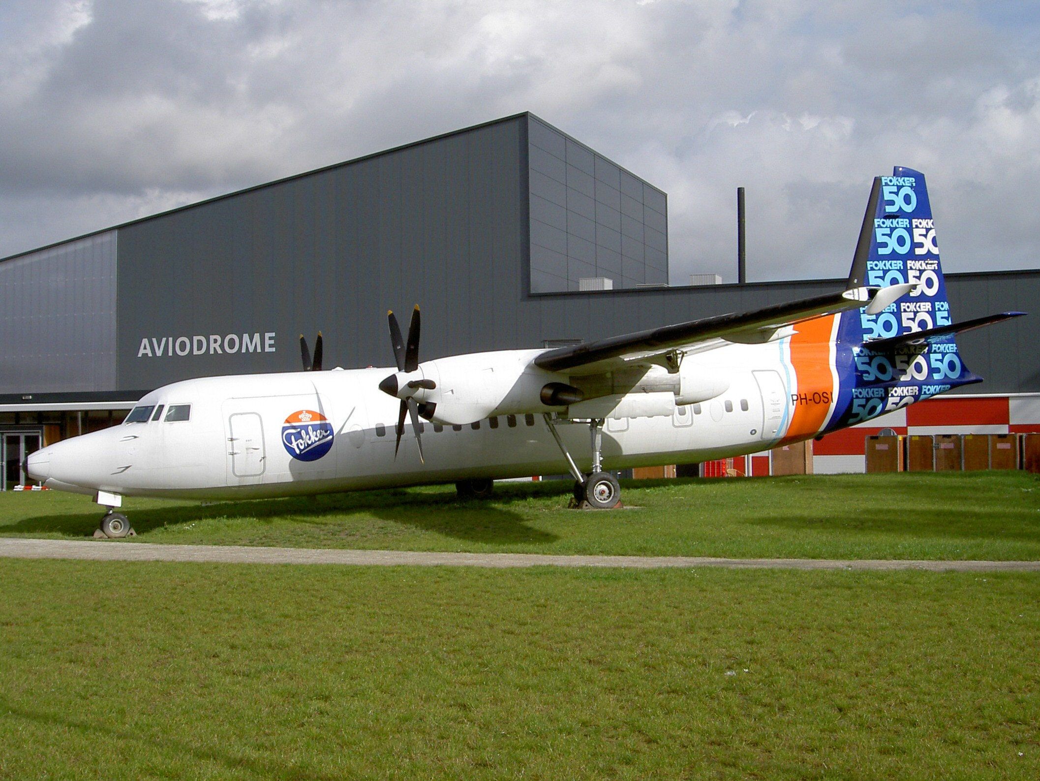 Fokker 50 Aviodrome PH-OSI at Lelystad airport aviodrome museum